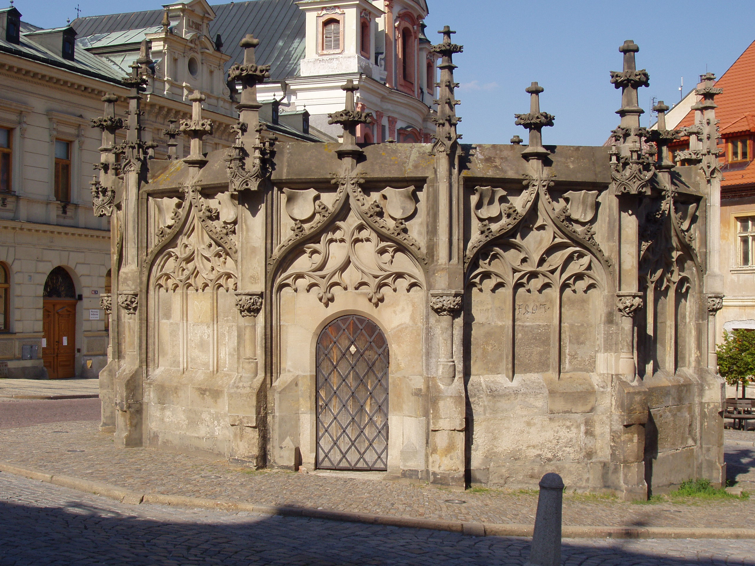 Rejskova kašna (Kutná Hora), Rejskovo nám., Kutná Hora